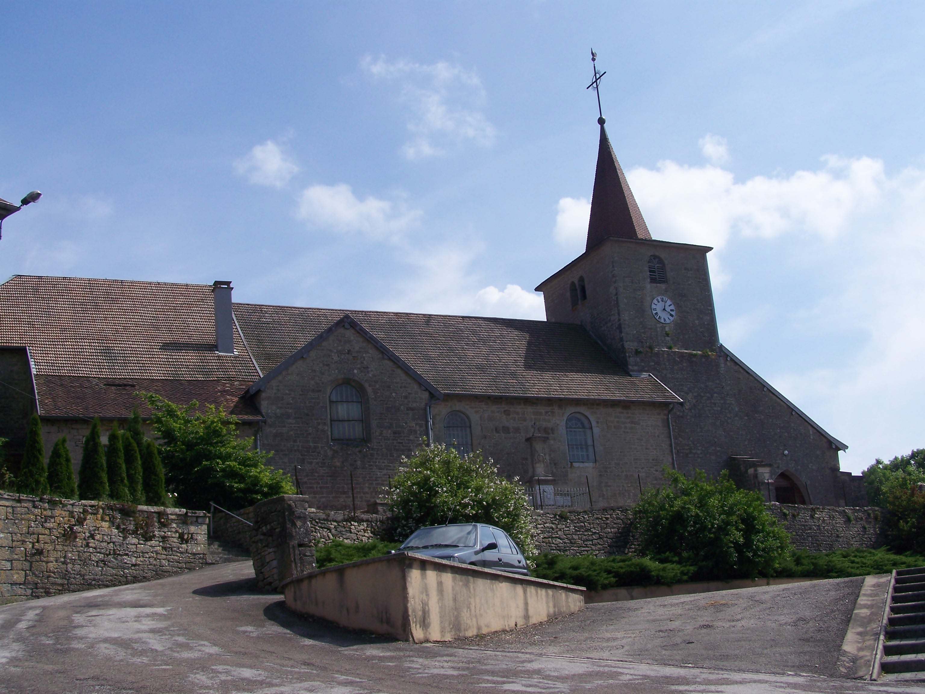 Eglise de CERNANS